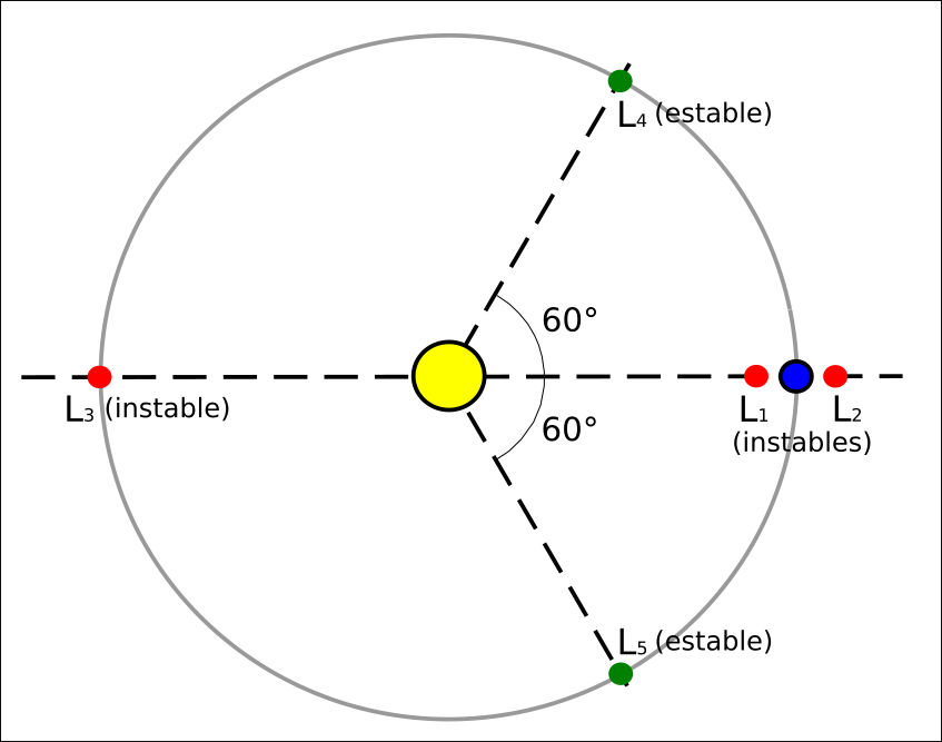 Esquèma generau dei ponchs de Lagrange dins lo cas d'una planeta en orbita a l'entorn dau Soleu.